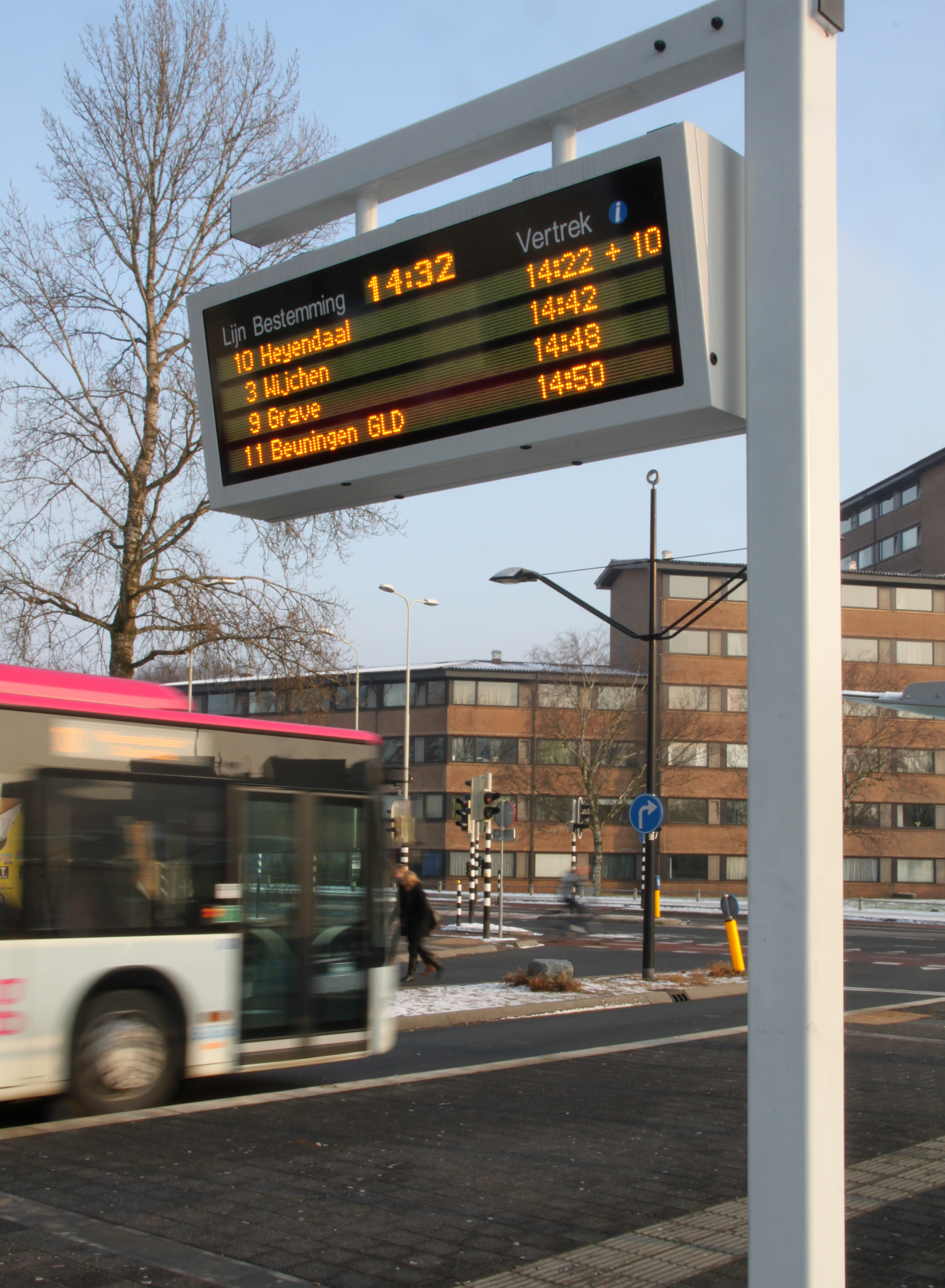 Een DRIS-paal bij station Nijmegen Heijendaal.